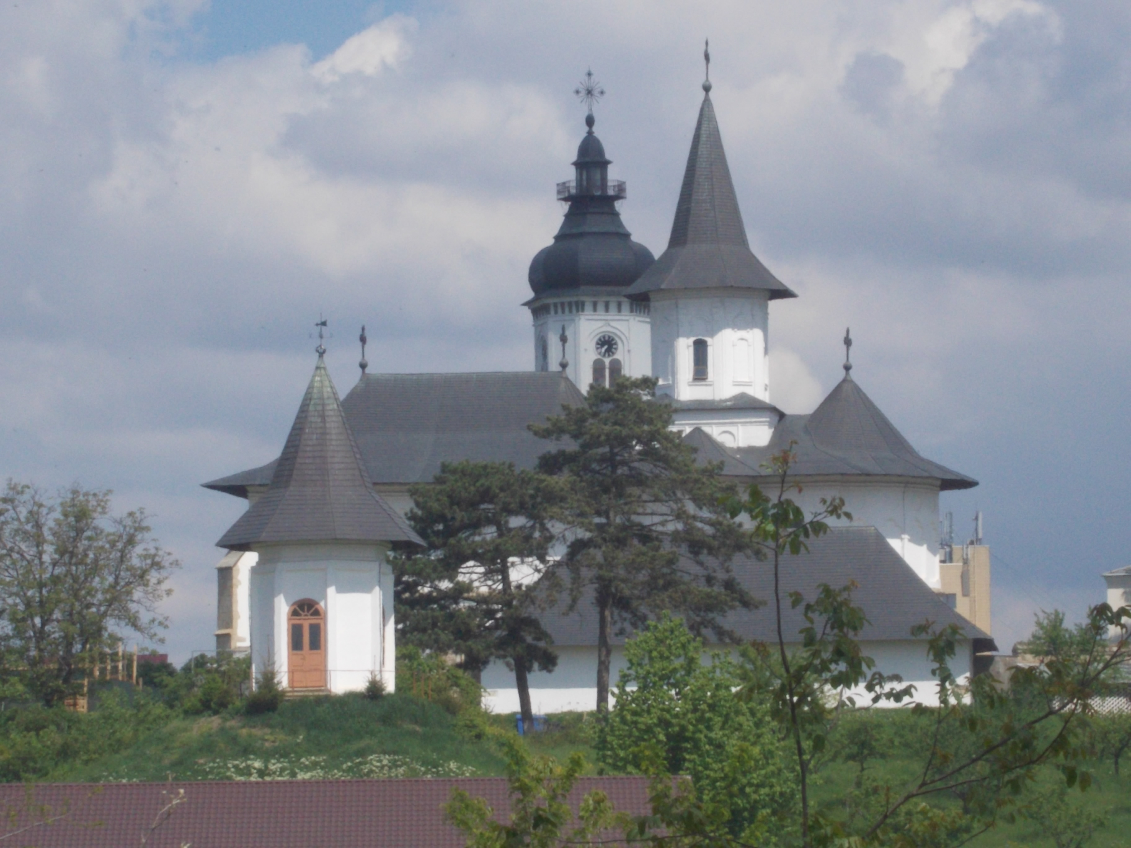 Episcopia Romanului, văzută din ştrand